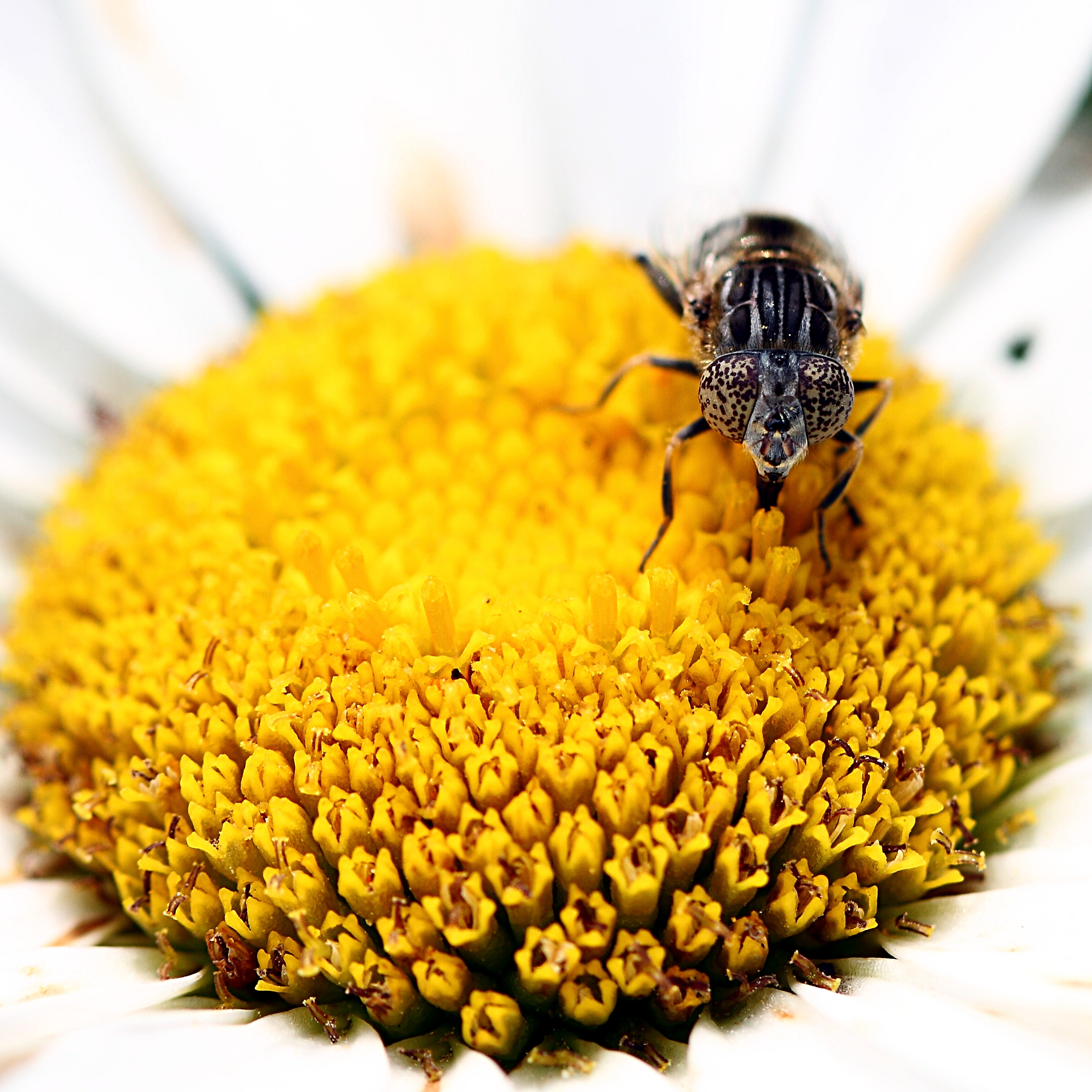 Sachsen, Blumengarten: Schwarze Augenfleck-Schwebfliege